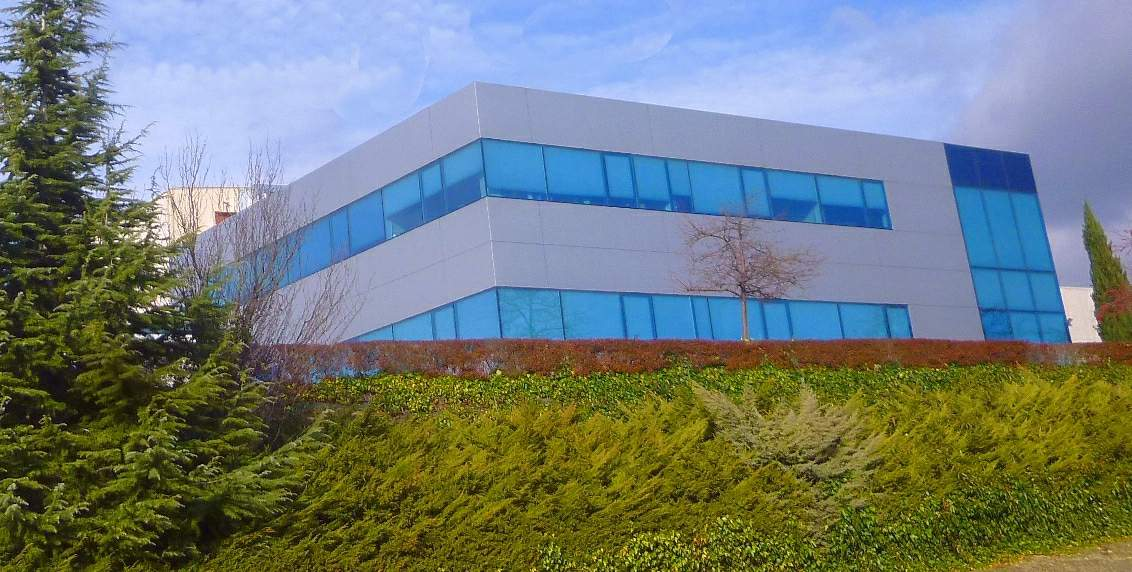 HQs de Aciturri Aeronáutica y Aciturri Aerostructures Ayuelas, en el Polígono Industrial de Bayas (Miranda de Ebro, Burgos)